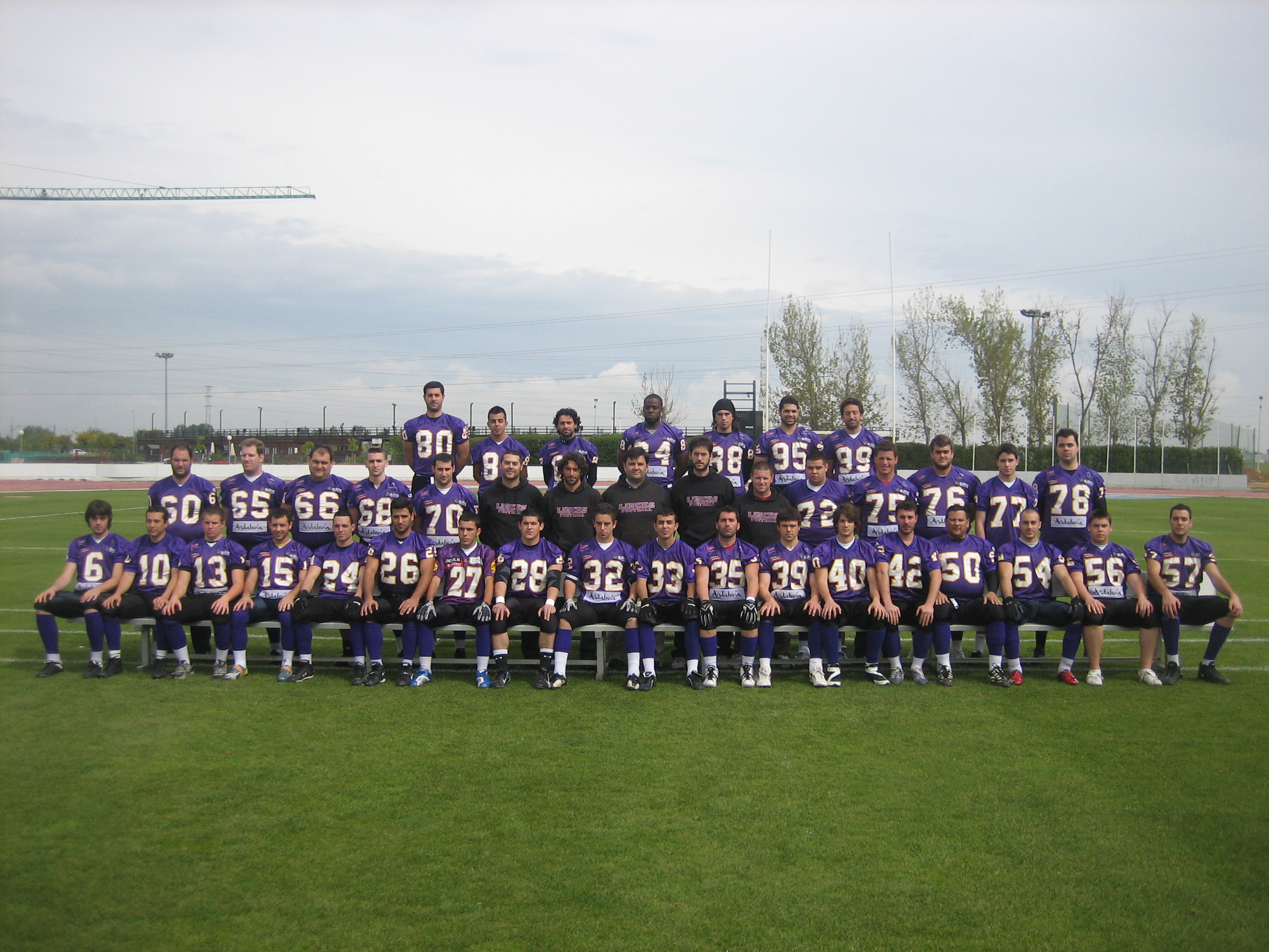 Foto oficial del C.D. Sevilla Linces para la temporada 2008-09